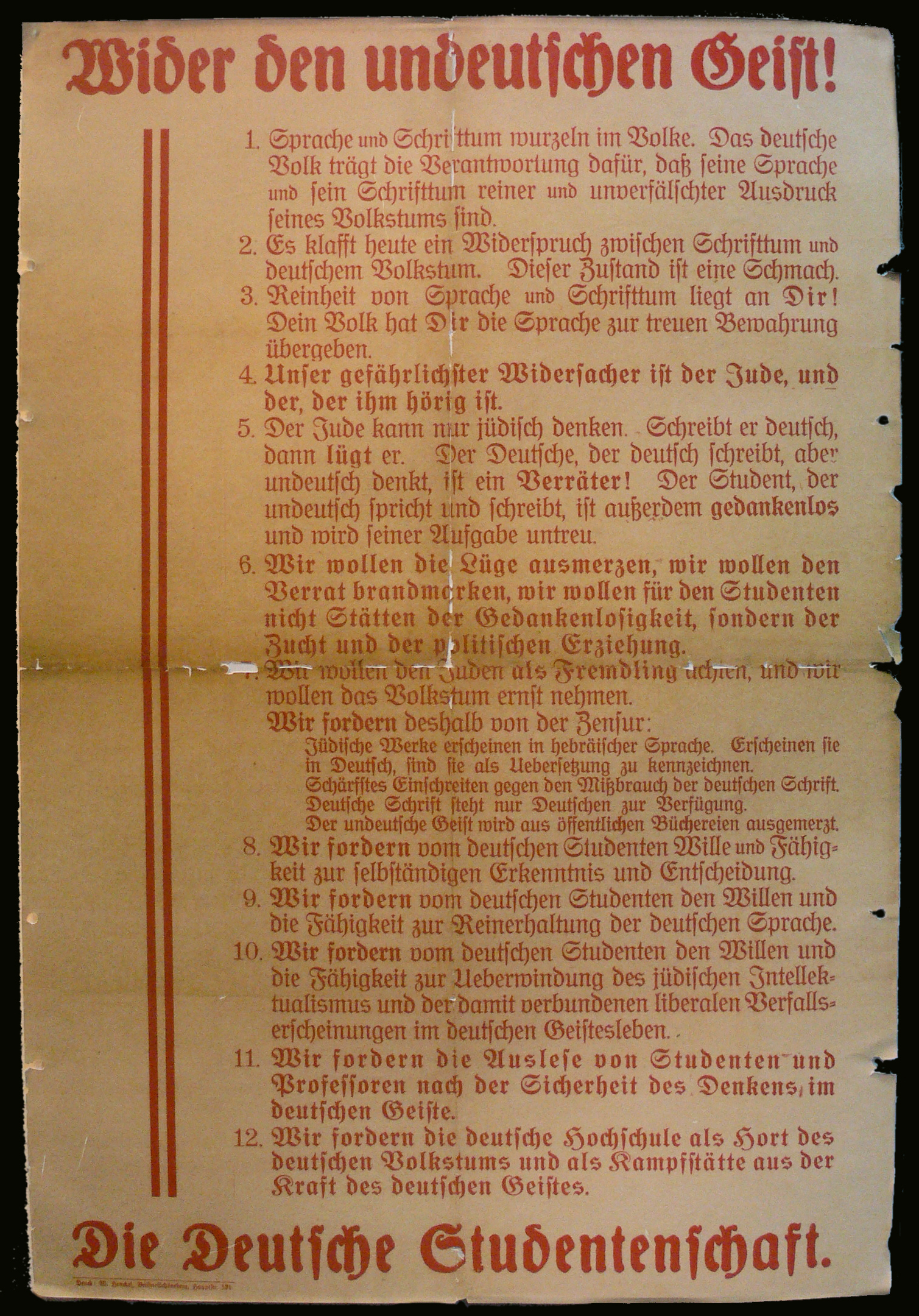 Flugblatt des NS-Studentenbundes, das 1933 zur Bücherverbrennung verbreitet wurde. Transkription siehe Bücherverbrennung 1933 in Deutschland#12 Thesen wider den undeutschen Geist